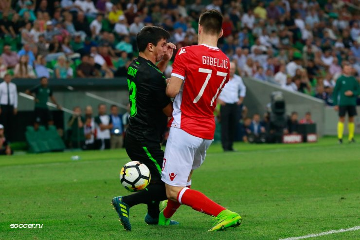 Марко Гобељић и Магомед Шапи Сулејманов на утакмици између Краснодара и Црвене звезде, 2017. године.